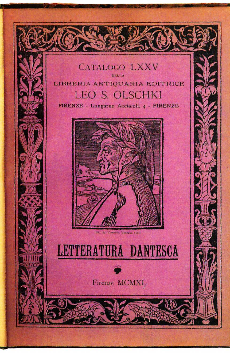 Leo S. Olschki Antiquariatskatalog Letteratura Dantesca 1911